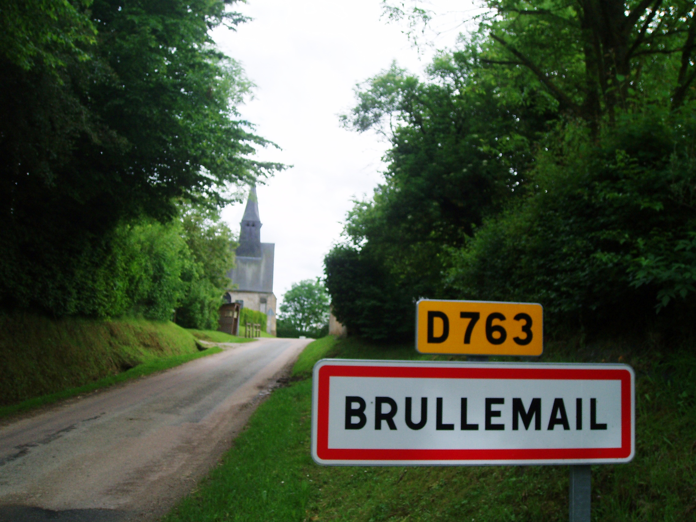 Entrée du village de Brullemail (Orne, France).